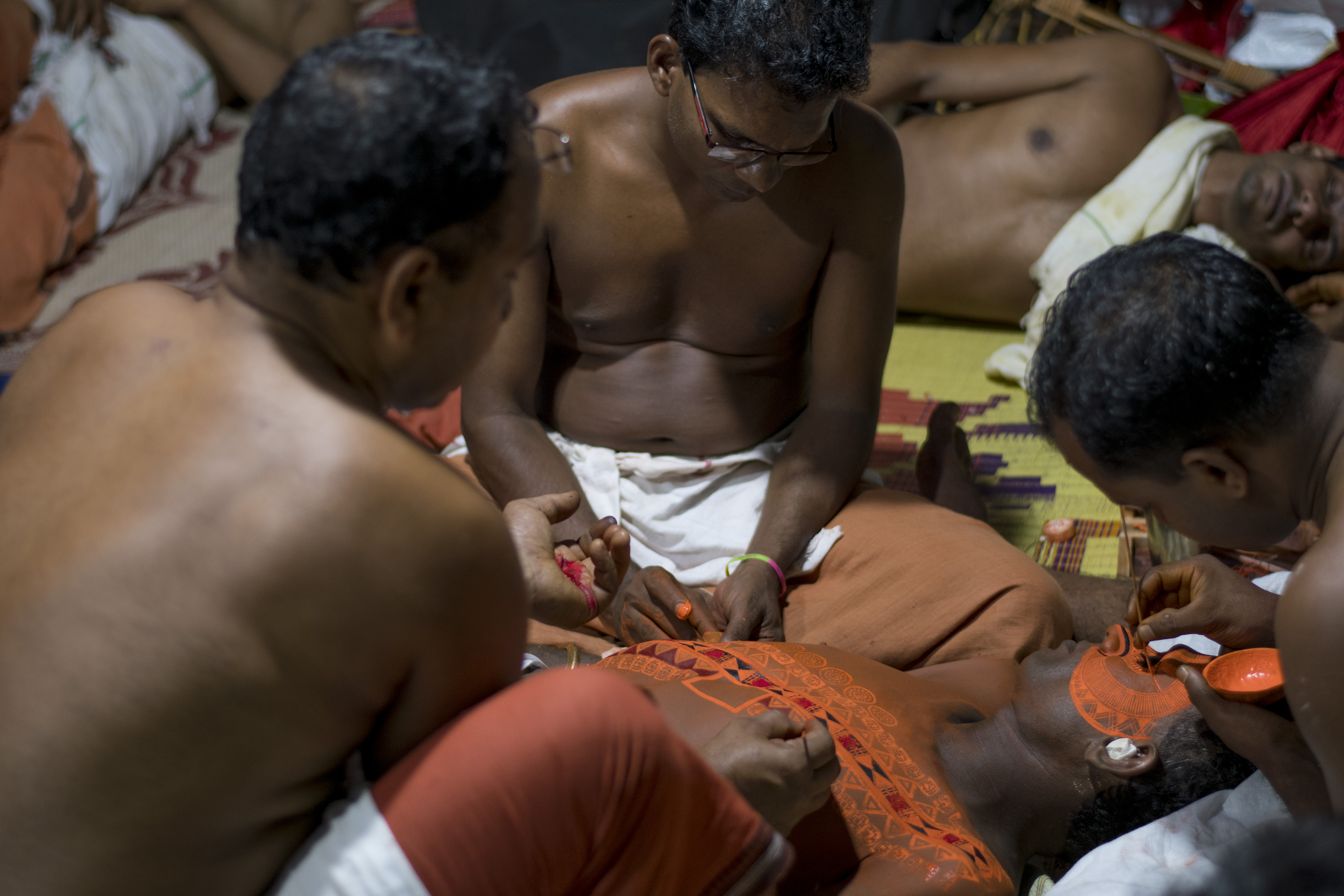 Theyyam at Kakkanam kottam, Edakkad, Kannur